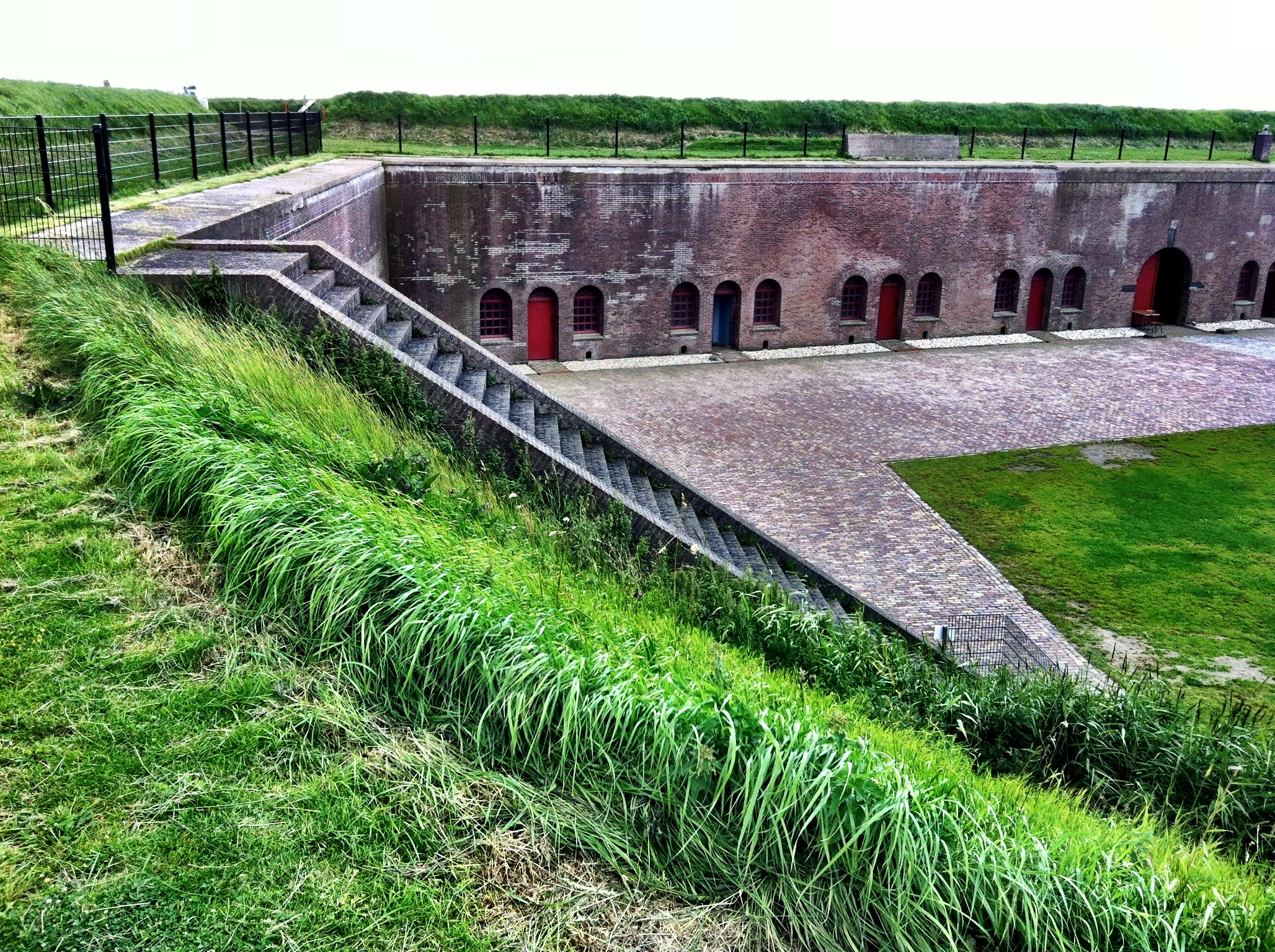 Inside Fort Ellewoutsdijk, seen from north wall.